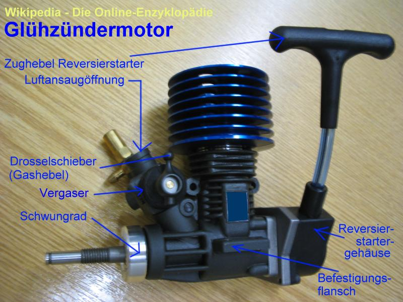 Glühzündermotor Rückseite